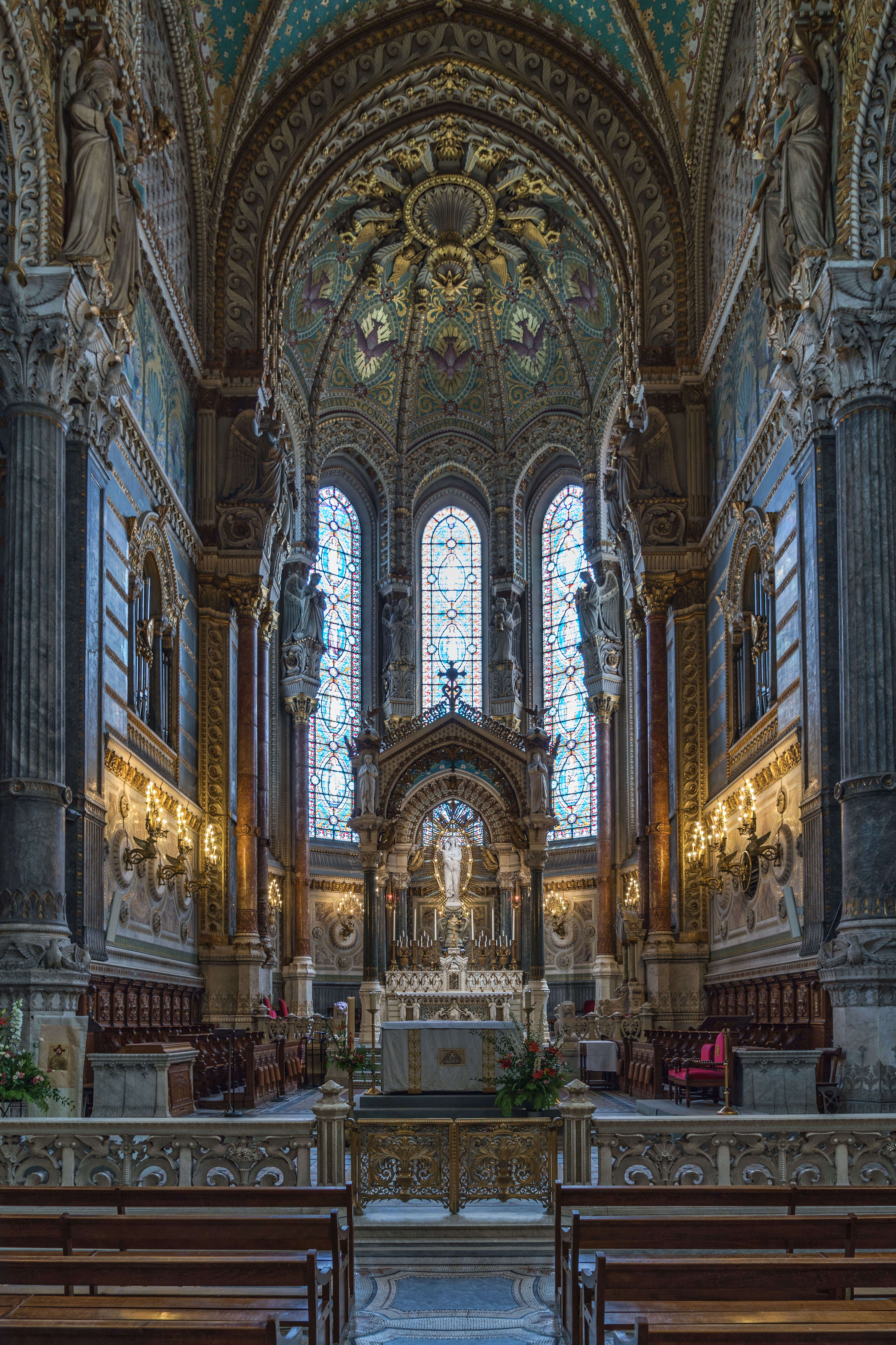 Lyon - Basilique de Fourvières - Abside